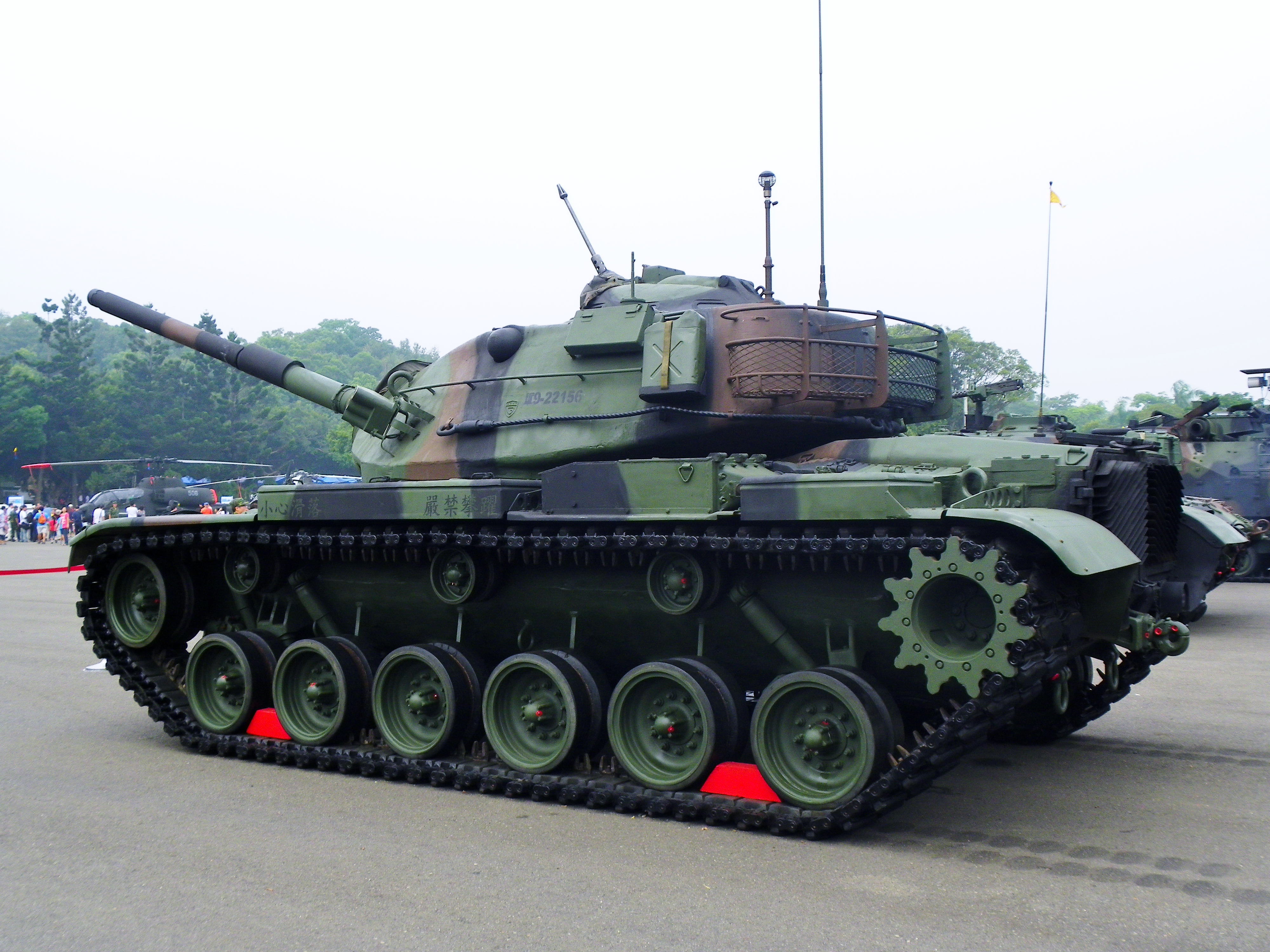 成功嶺展示的中華民國陸軍M60A3 TTS左斜後方側視。